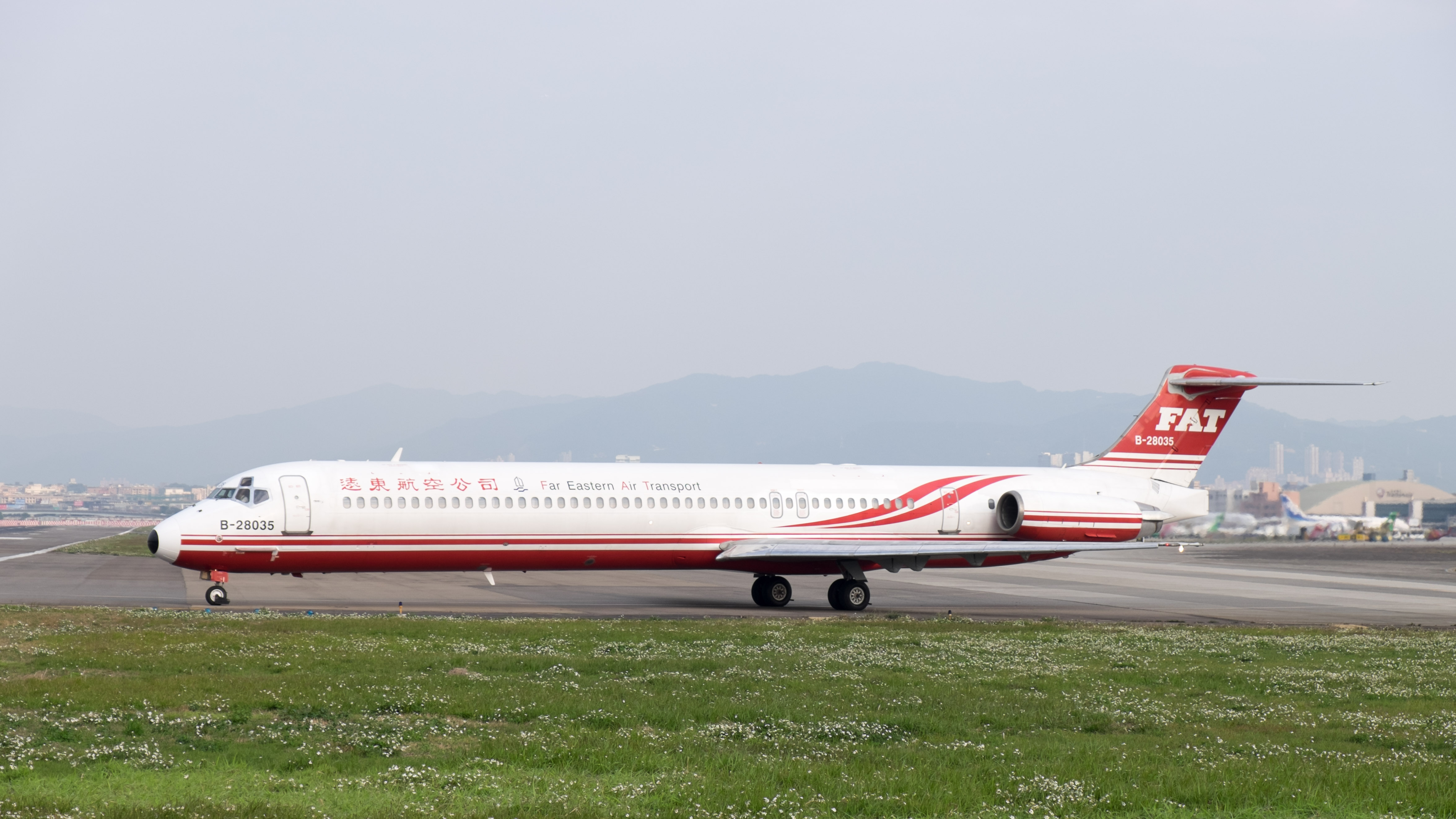 遠東航空MD-82 B-28035進入臺北松山機場跑道。